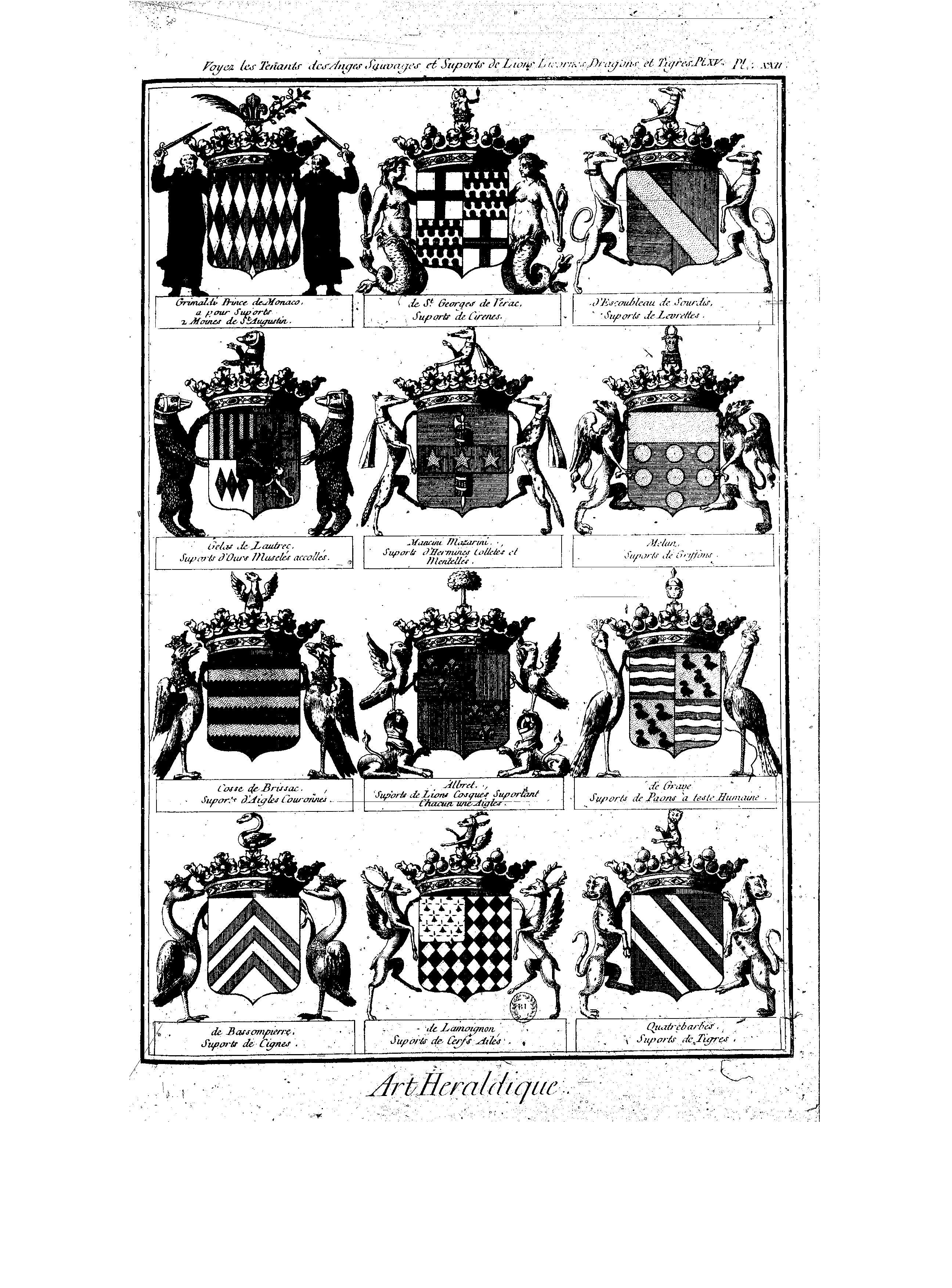 Planches de l'Encyclopédie de Diderot et d'Alembert, volume 2